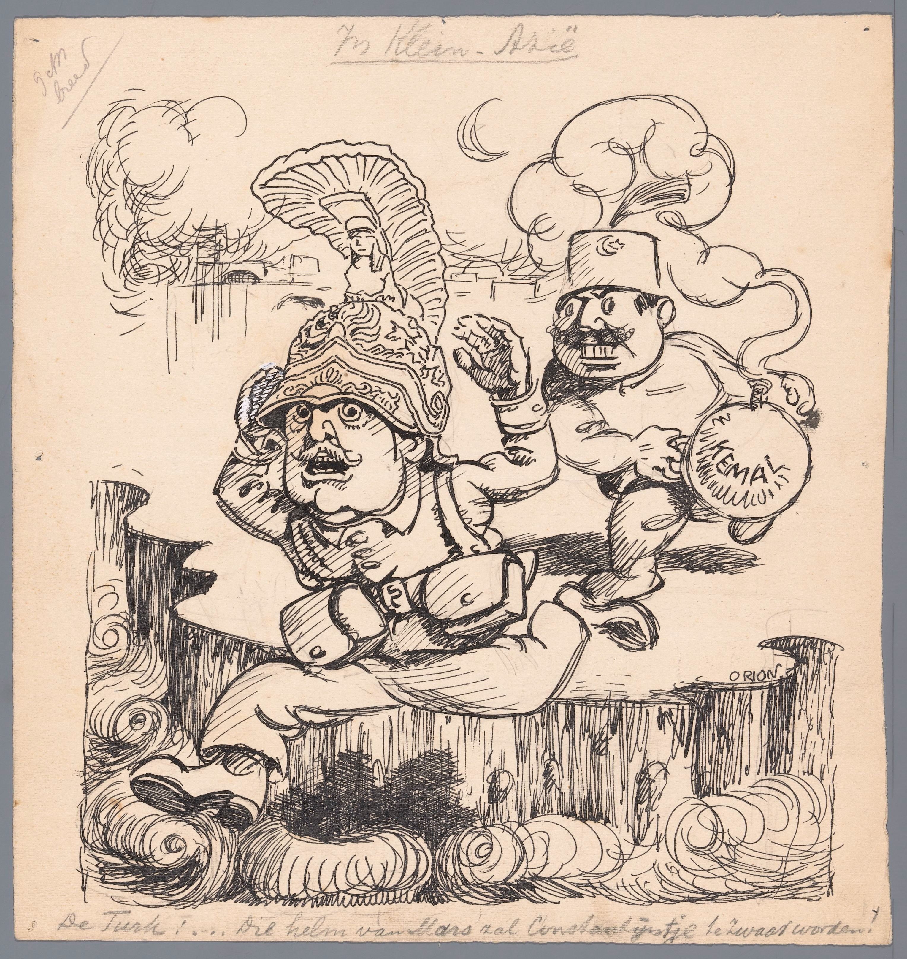 IdentificatieTitel(s): Turkije verjaagt GriekenlandIn Klein-Azië (titel op object)Objecttype: tekening Objectnummer: NG-505-108Opschriften / Merken: opschrift, boven en onder, handgeschreven: ‘In Klein-Azië / De Turk: Die helm van Mars zal Constantijntje te zWaar: worden!’Omschrijving: Kemal Atatürk verjaagt met een bom de Griekse koning Constantijn I. Naar aanleiding van de Grieks-Turkse Oorlog (1919-1922) Ontwerp voor een politieke spotprent.VervaardigingVervaardiger: tekenaar: Patricq Kroon (eigenhandig gesigneerd)Plaats vervaardiging: NederlandDatering: 1919 - 1922Fysieke kenmerken: potlood, pen in zwartMateriaal: papier inkt potlood Techniek: penAfmetingen: h 251 mm × b 236 mmOnderwerpWanneer: 1919 - 1922Wie: Constantijn I (koning van Griekenland)Kemal AtatürkVerwerving en rechtenCredit line: Schenking van J. Kroon, GorsselVerwerving: schenking 1965Copyright: Publiek domein